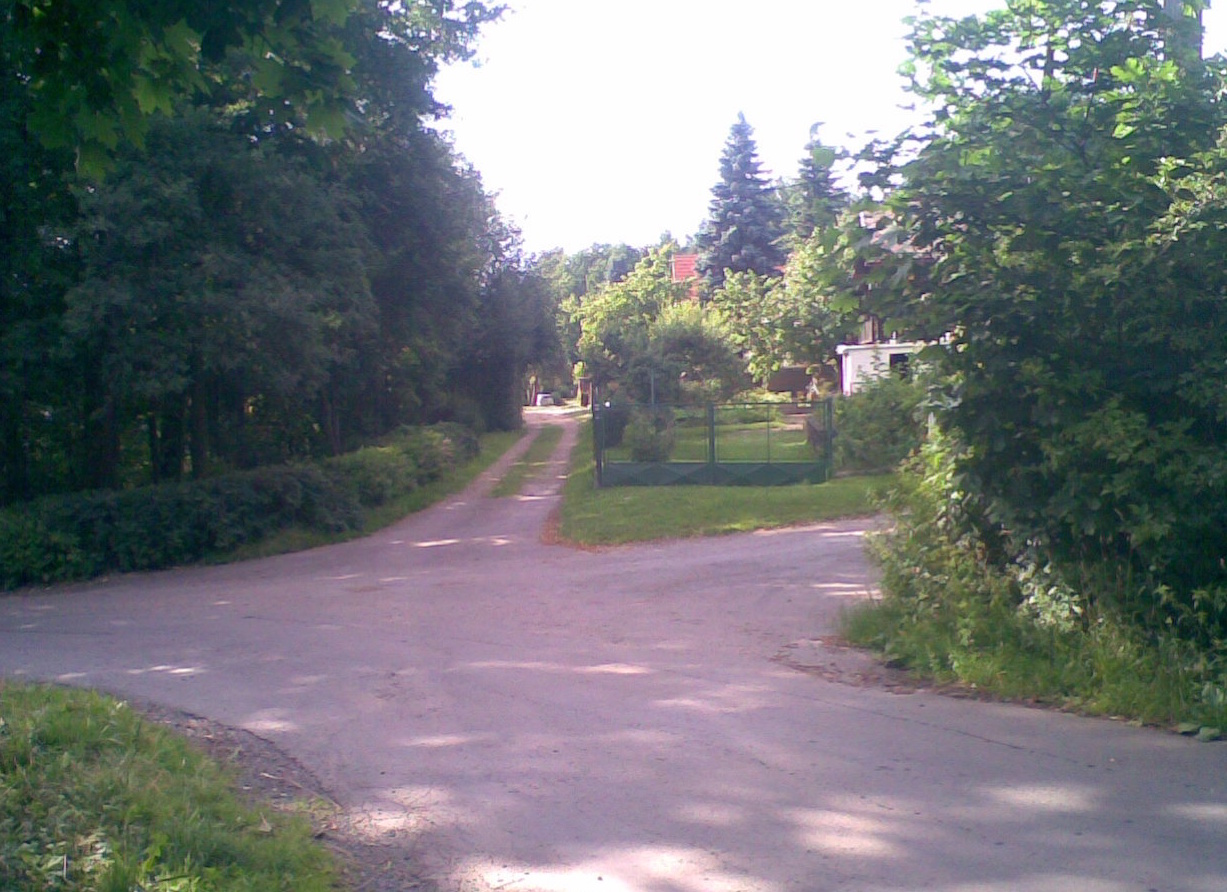 Vilková čtvrť Pětidomí